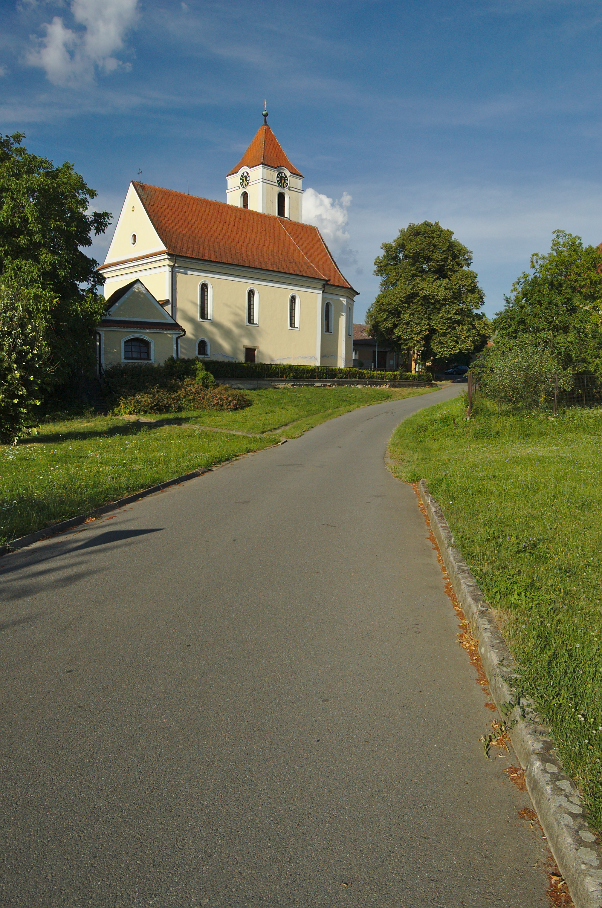 Kostel svatých Filipa a Jakuba, Cetkovice, okres Blansko